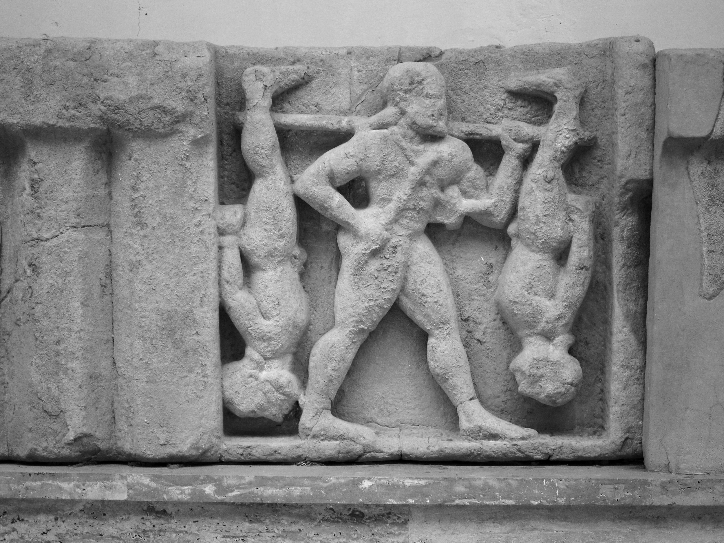 Métope du thesauros représentant Héraclès et les Cercopes à Paestum (Italie).